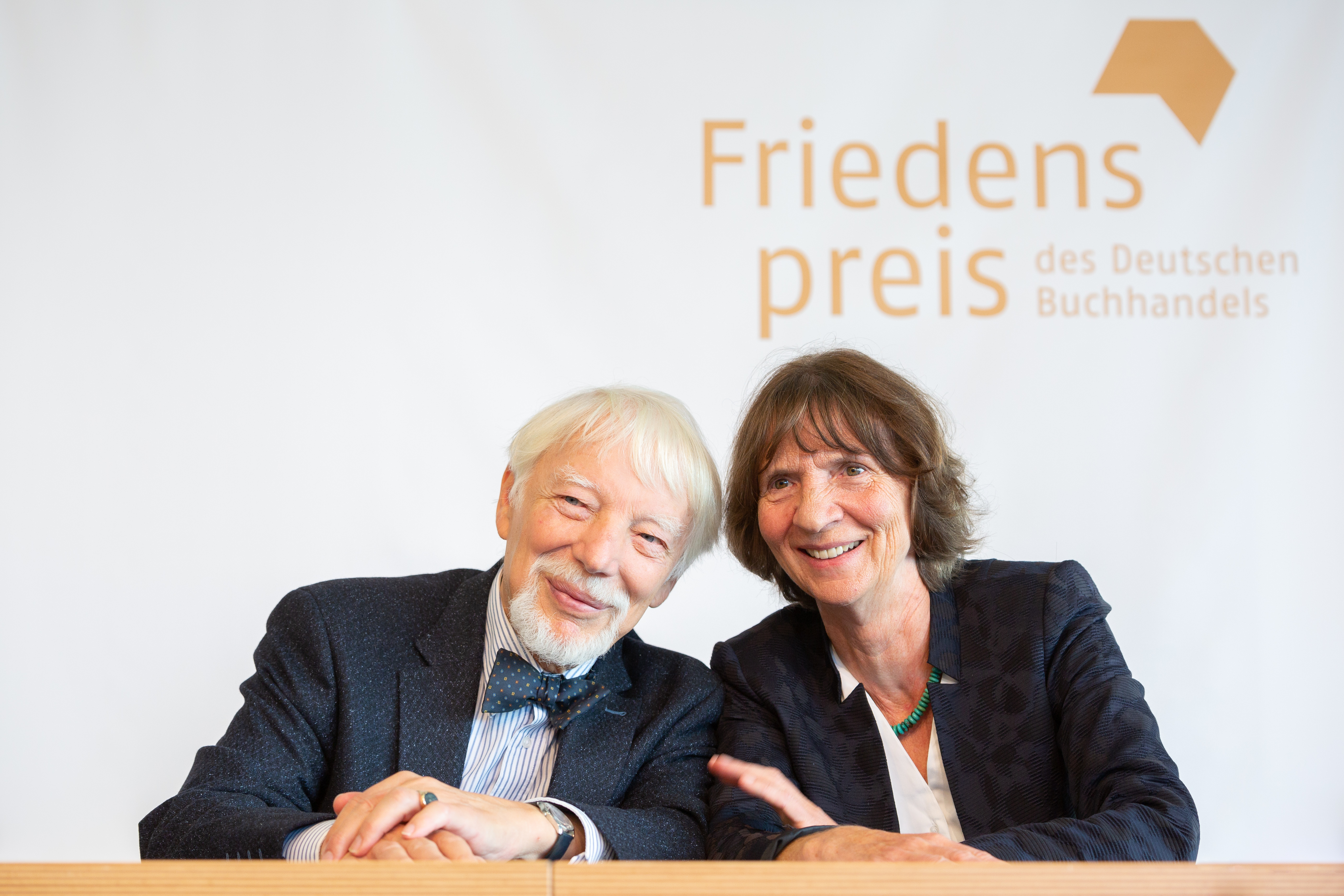 Jan und Aleida Assmann, die Preisträger des Friedenspreises des deutschen Buchhandels 2018, bei einer Pressekonferenz im Rahmen der Frankfurter Buchmesse 2018